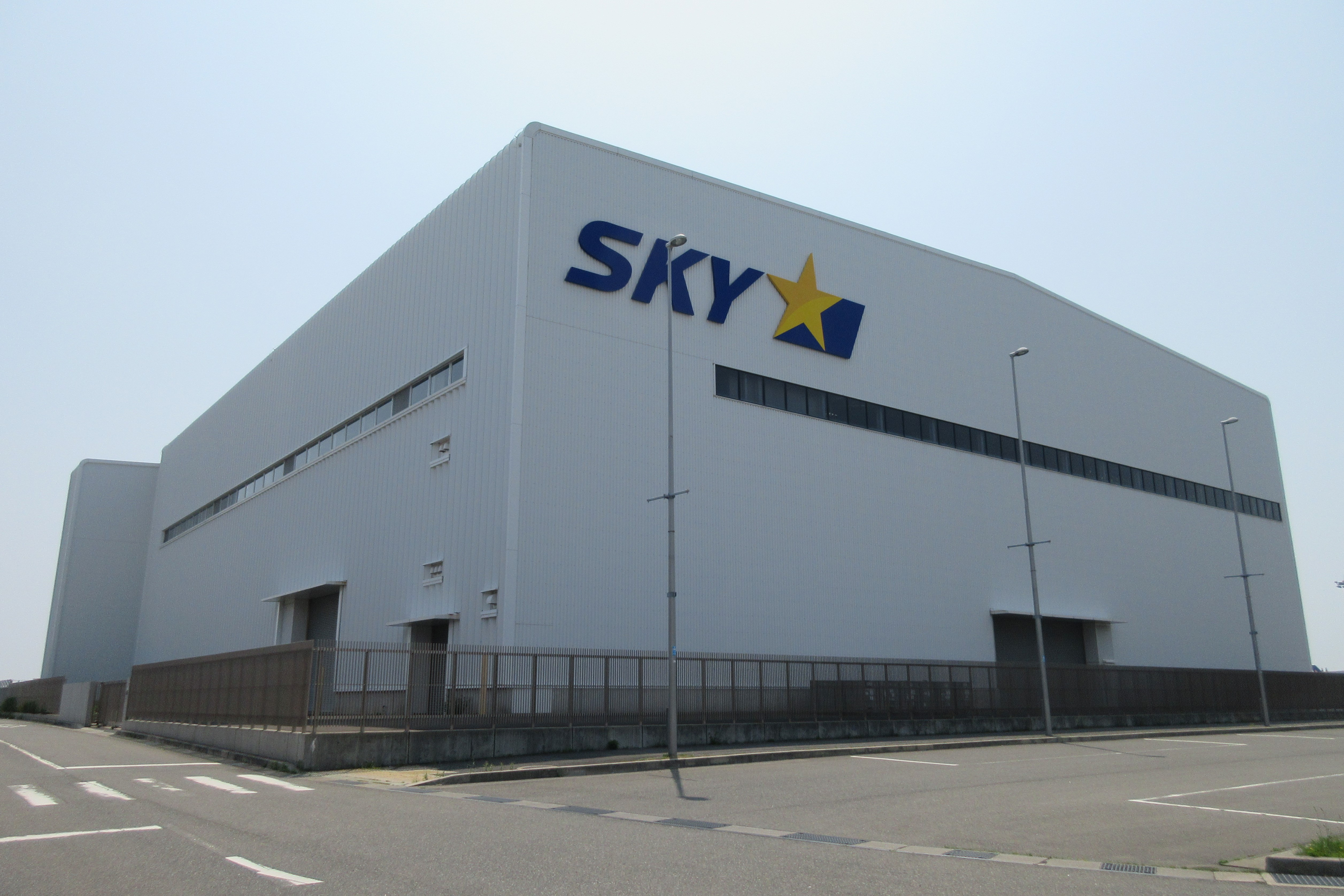 スカイマーク神戸空港格納庫